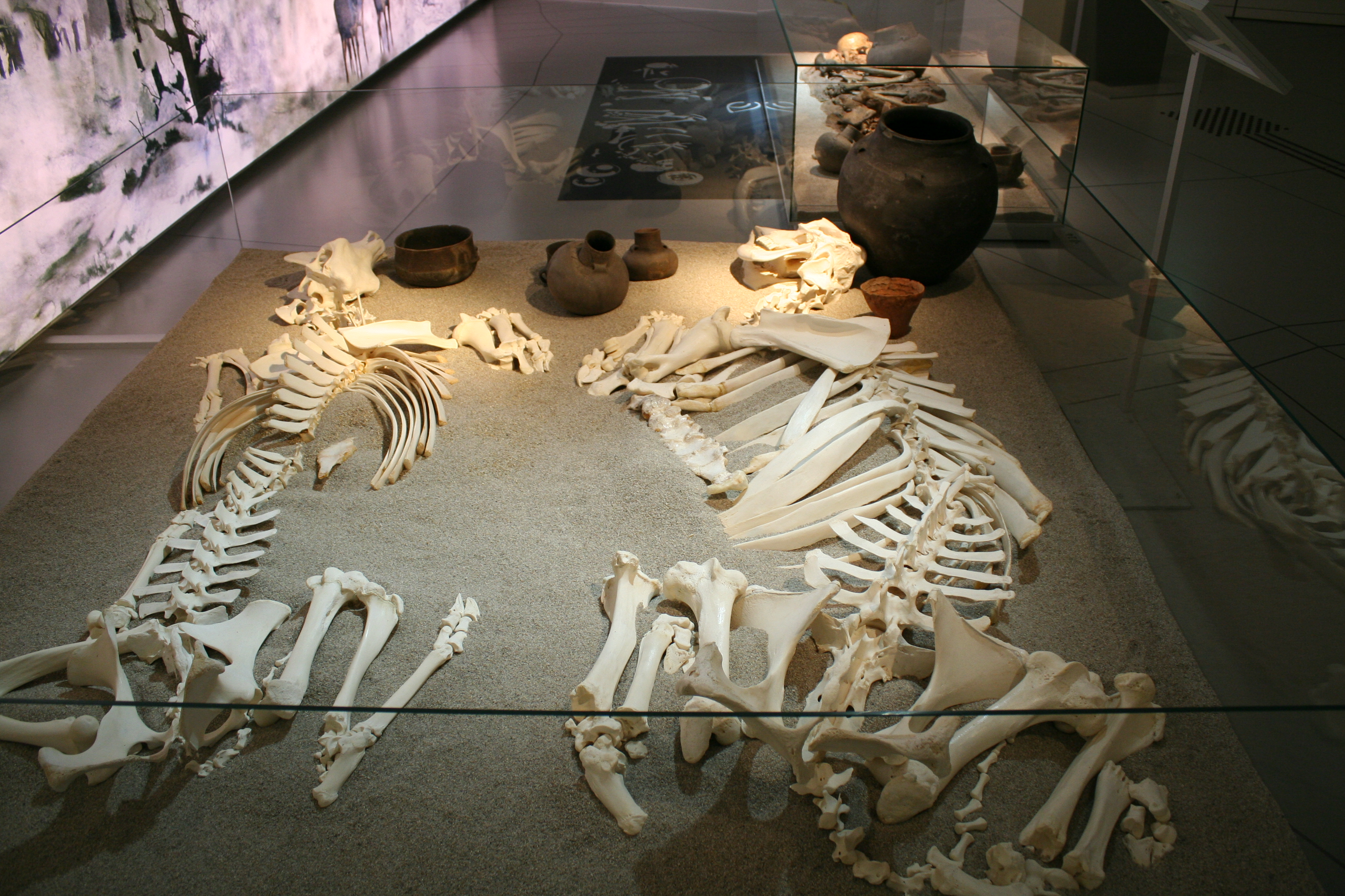 Rinderbestattung der Kugelamphorenkultur aus Zauschwitz, 3300-2800 v. Chr.; Staatliches Museum für Archäologie Chemnitz